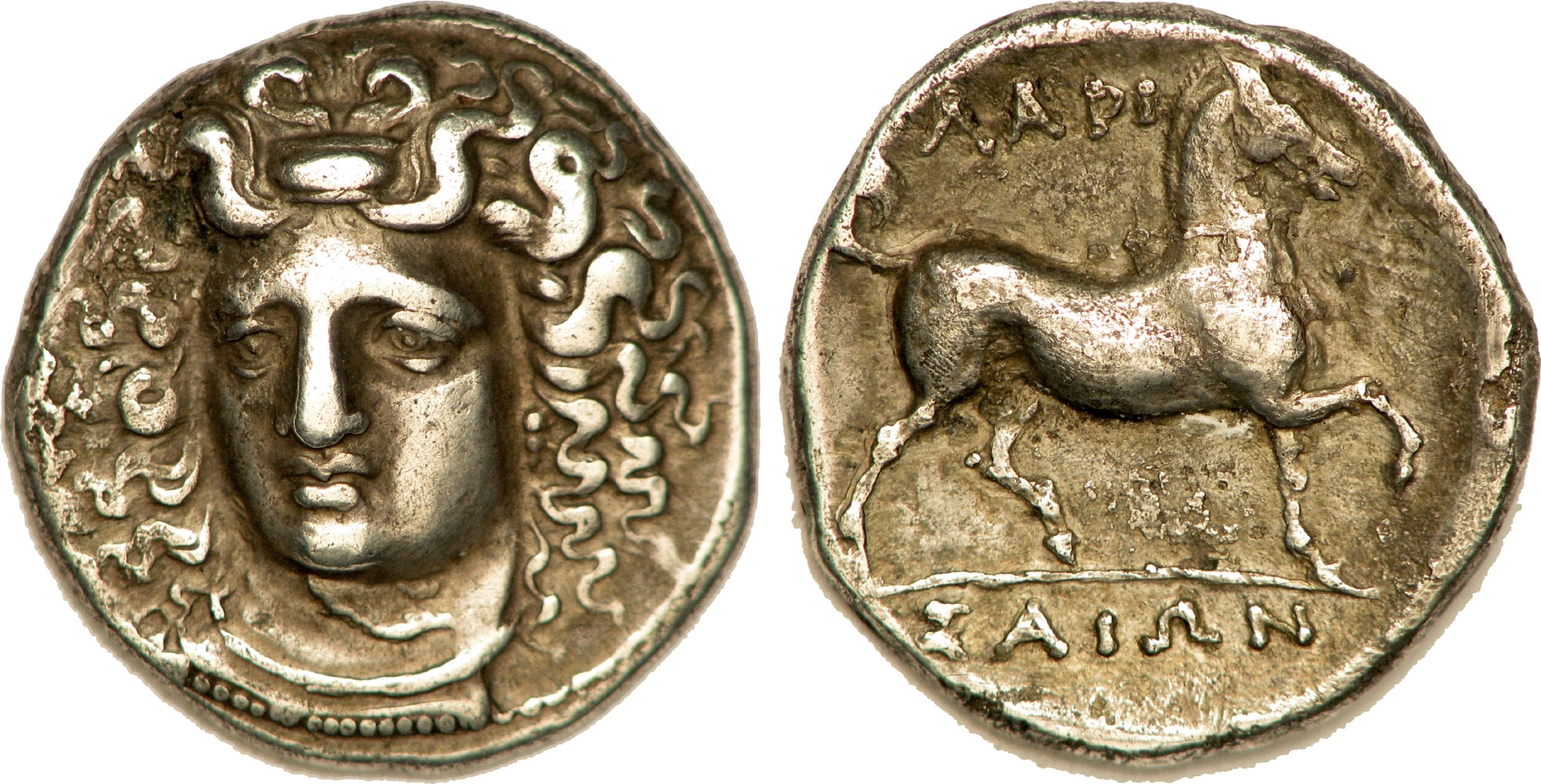 Nom de l'atelier : Thessalie, Larissa Métal : argent Diamètre : 24,5mm Axe des coins : 12h. Poids : 11,90g. Titulature avers : Anépigraphe. Description avers : Tête de la nymphe Larissa de face tournée de trois-quarts à gauche, les cheveux flottants, retenus par un bandeau (ampyx) avec boucles d'oreille et collier. Description revers : Cheval passant au trot à droite, levant l'antérieur droit avec la bride sur le cou. Légende revers : LARI//SAIWN/ [M]. Traduction revers : (de Larissa).